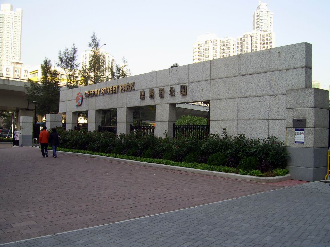 中文（香港）: 櫻桃街公園